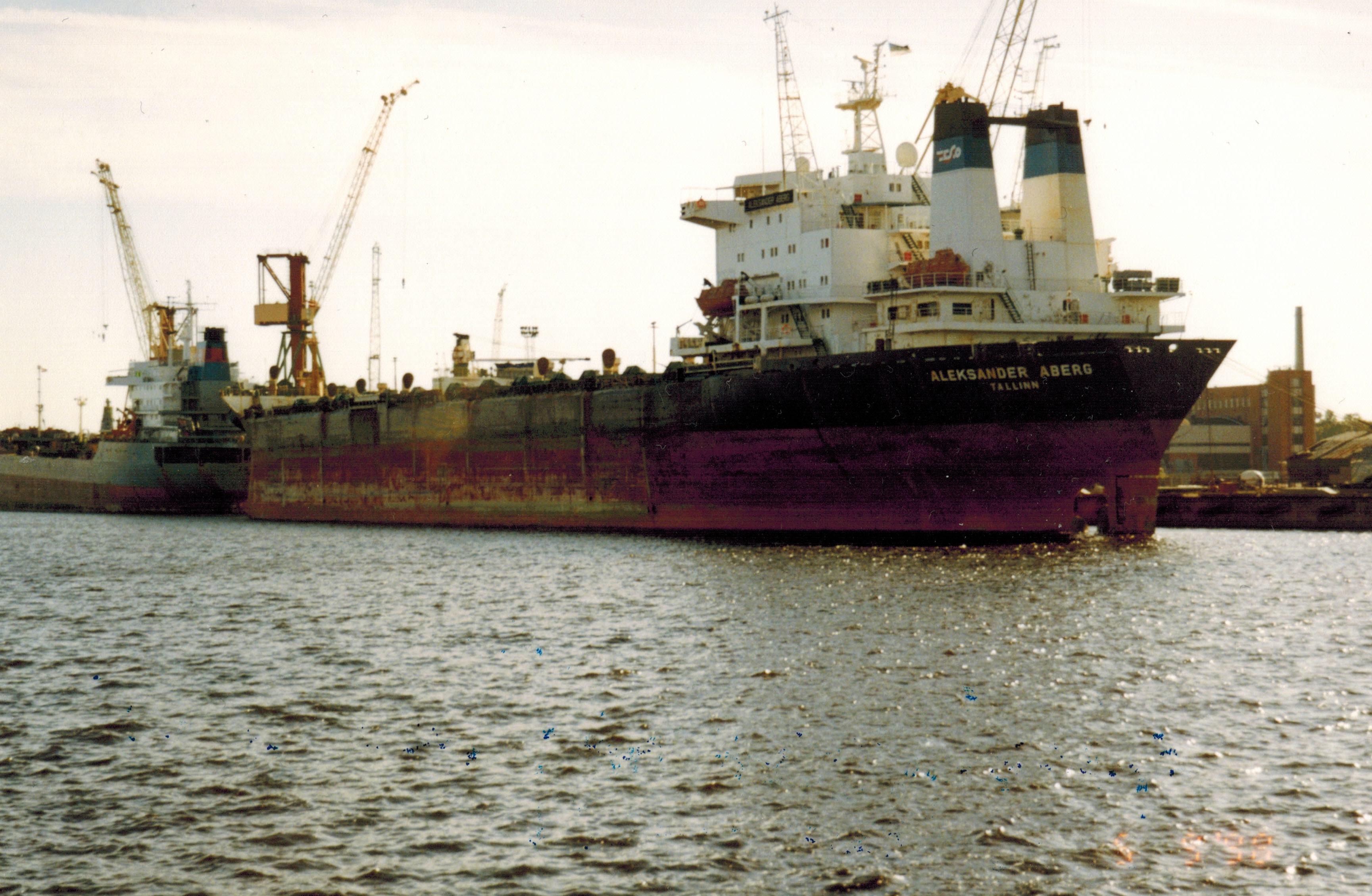 Puistlastilaev Aleksaner Aberg remondis Riias 1998. a